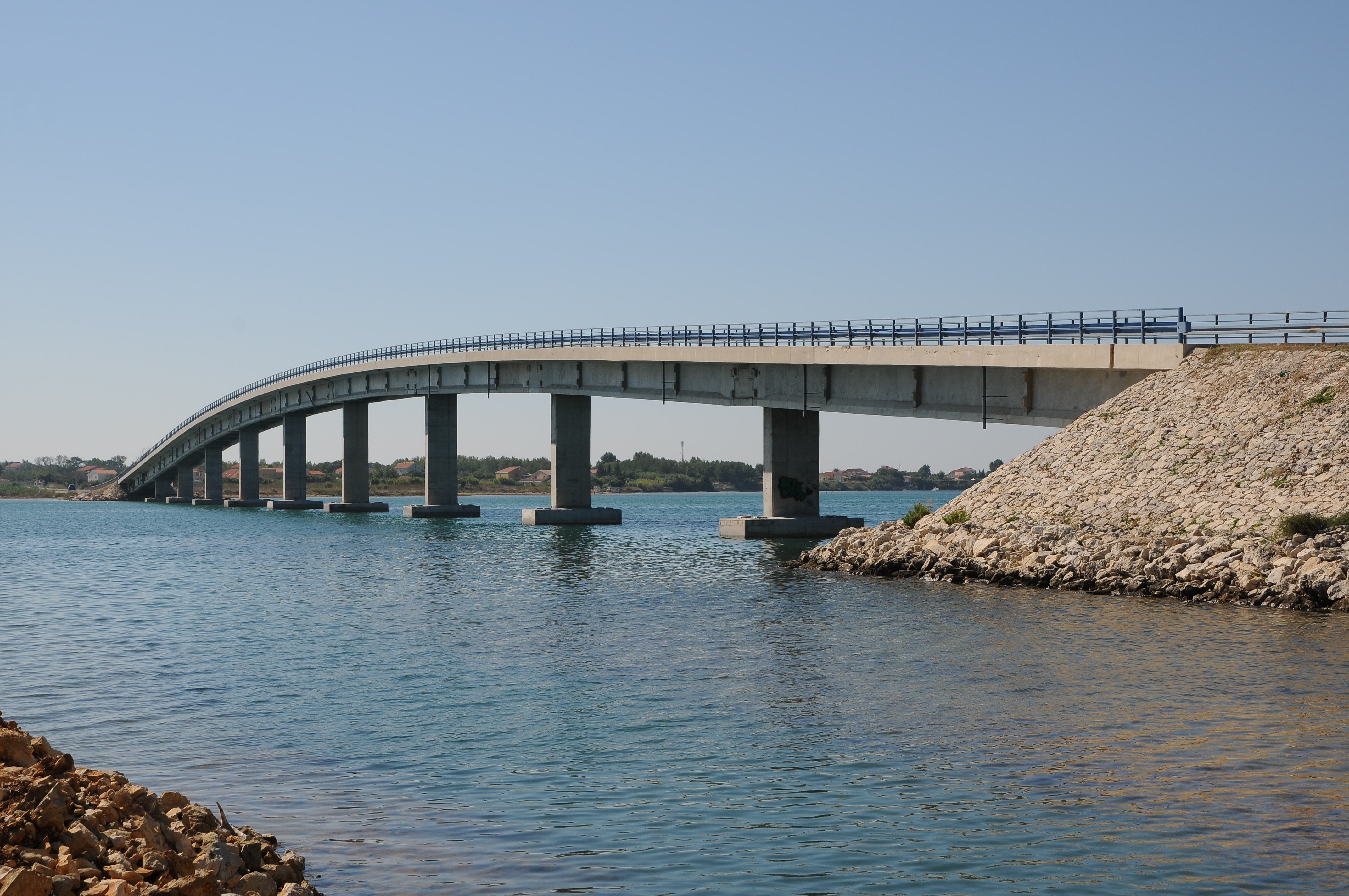 Brücke von Privlaka (Dalmatien) nach Vir (Kroatien).